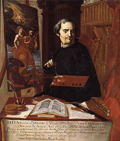 Portrait of Acisclo Antonio Palomino de Castro y Velasco